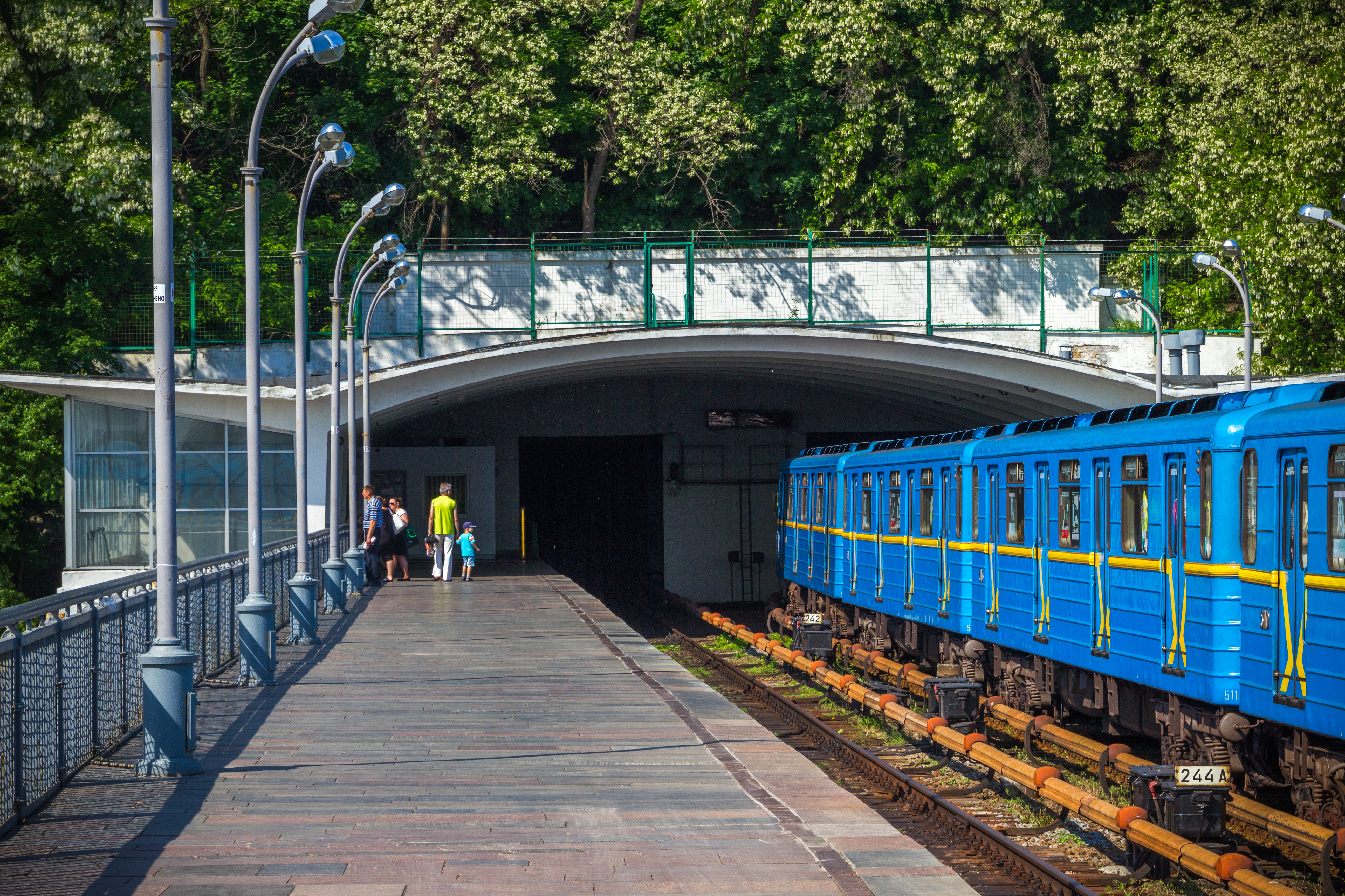 Днепр (станция метро, Киев)